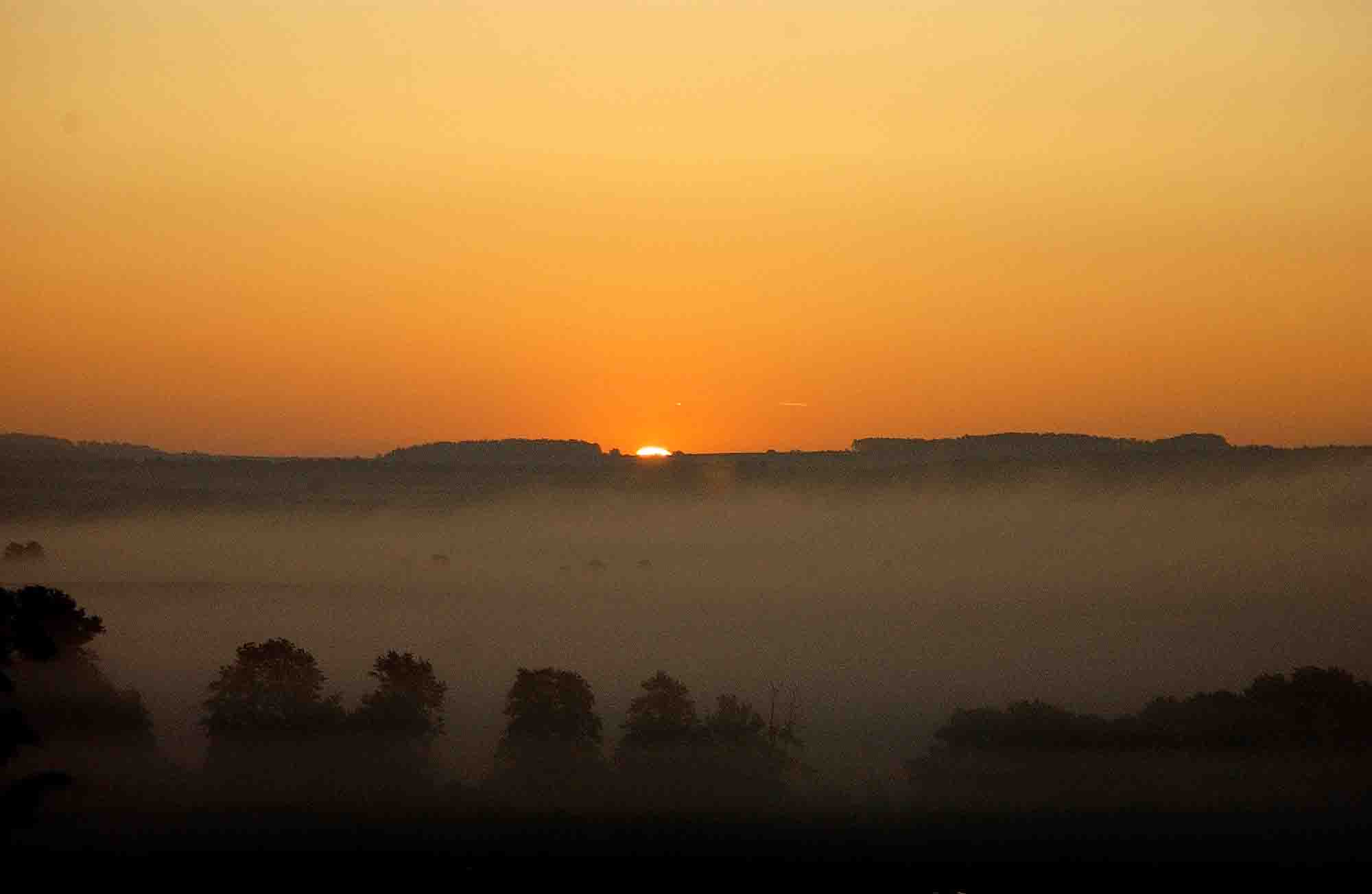 Sonnenaufgang in Burglauer, mit Blick Richtung Flugplatz Bad Neustadt/Saale